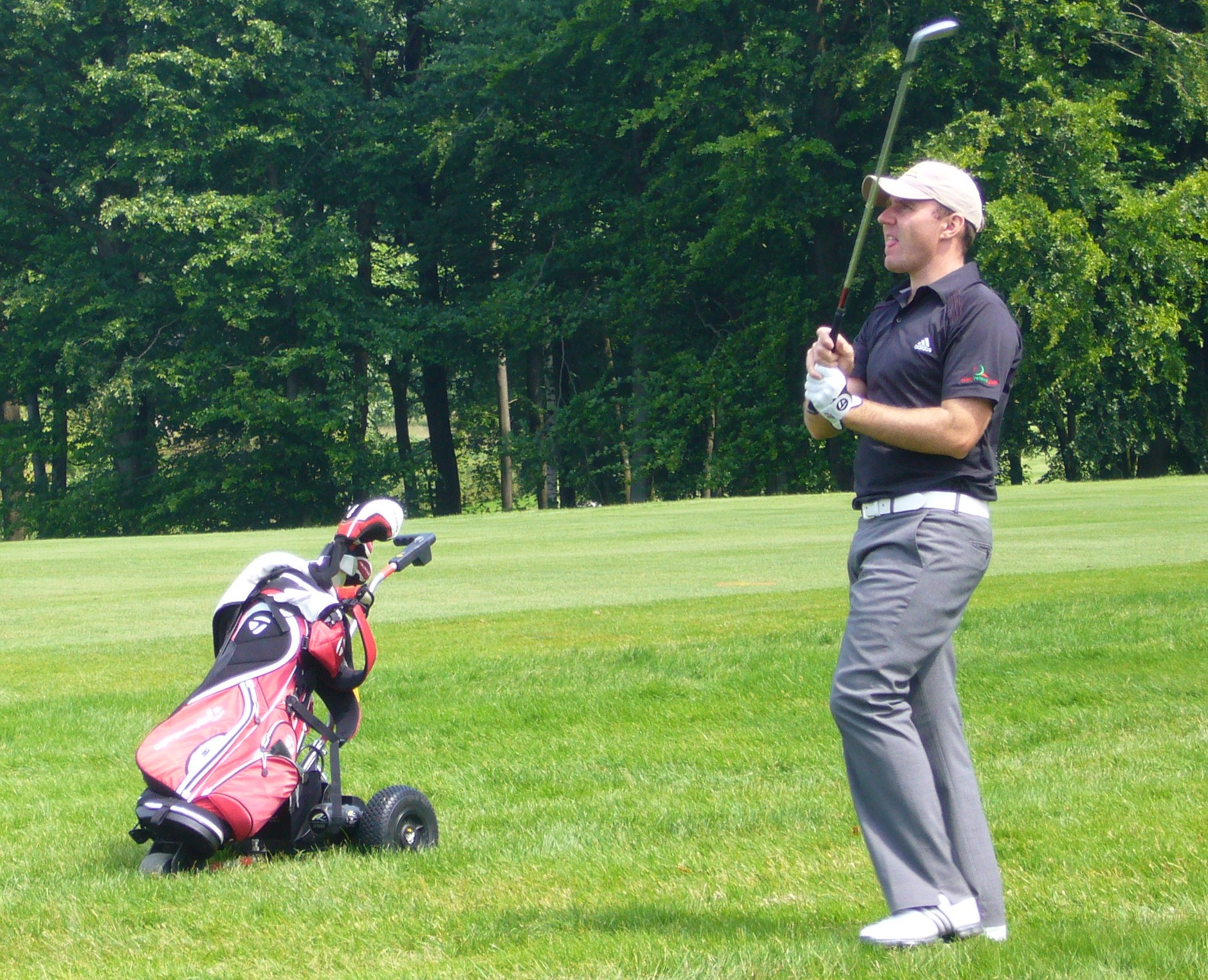 Colm Moriarty tijdens de Telenet Trophy